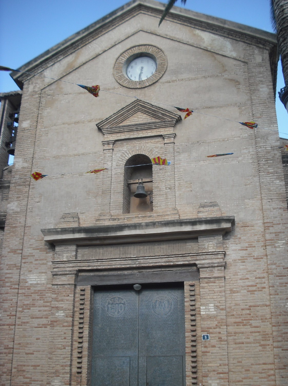 Portada de l'església de Llocnou de la Corona.